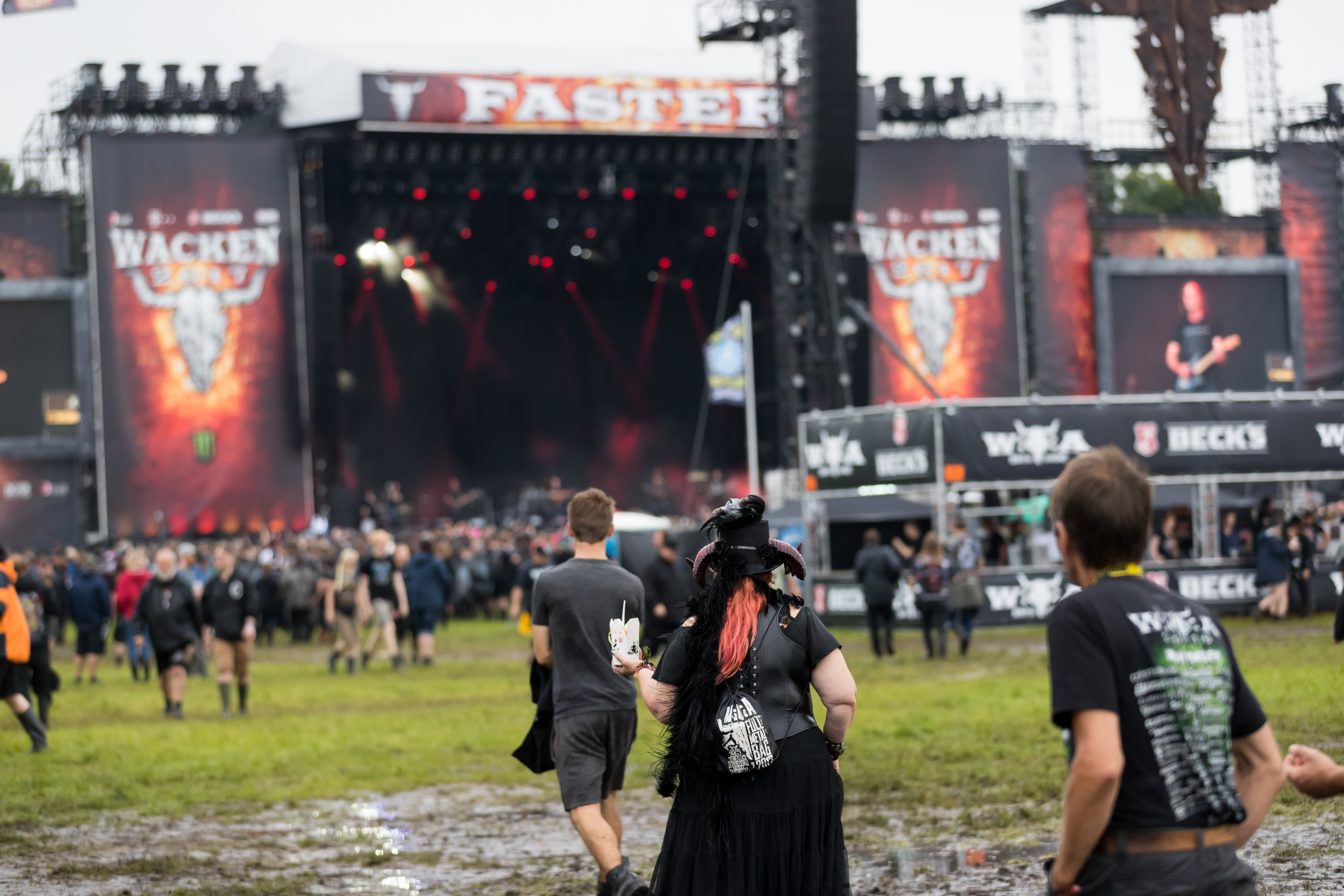 Skyline during Wacken Open Air at Schleswig-Holstein, Wacken, , Germany on 2017-08-03, Photo: Sven Mandel